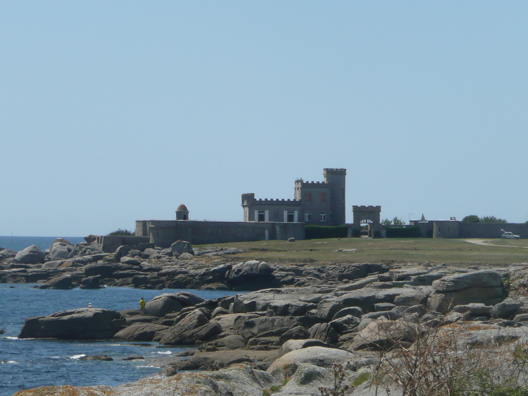 Château de Trévignon à Trégunc